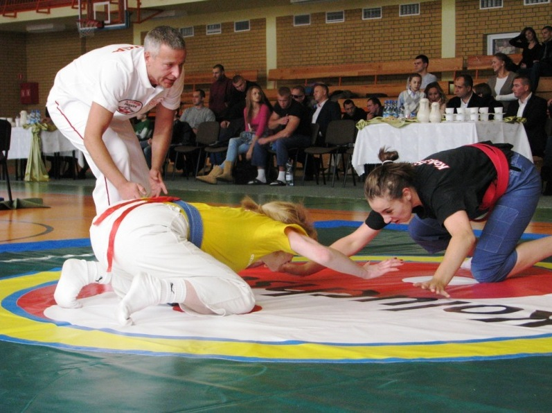 Zawody